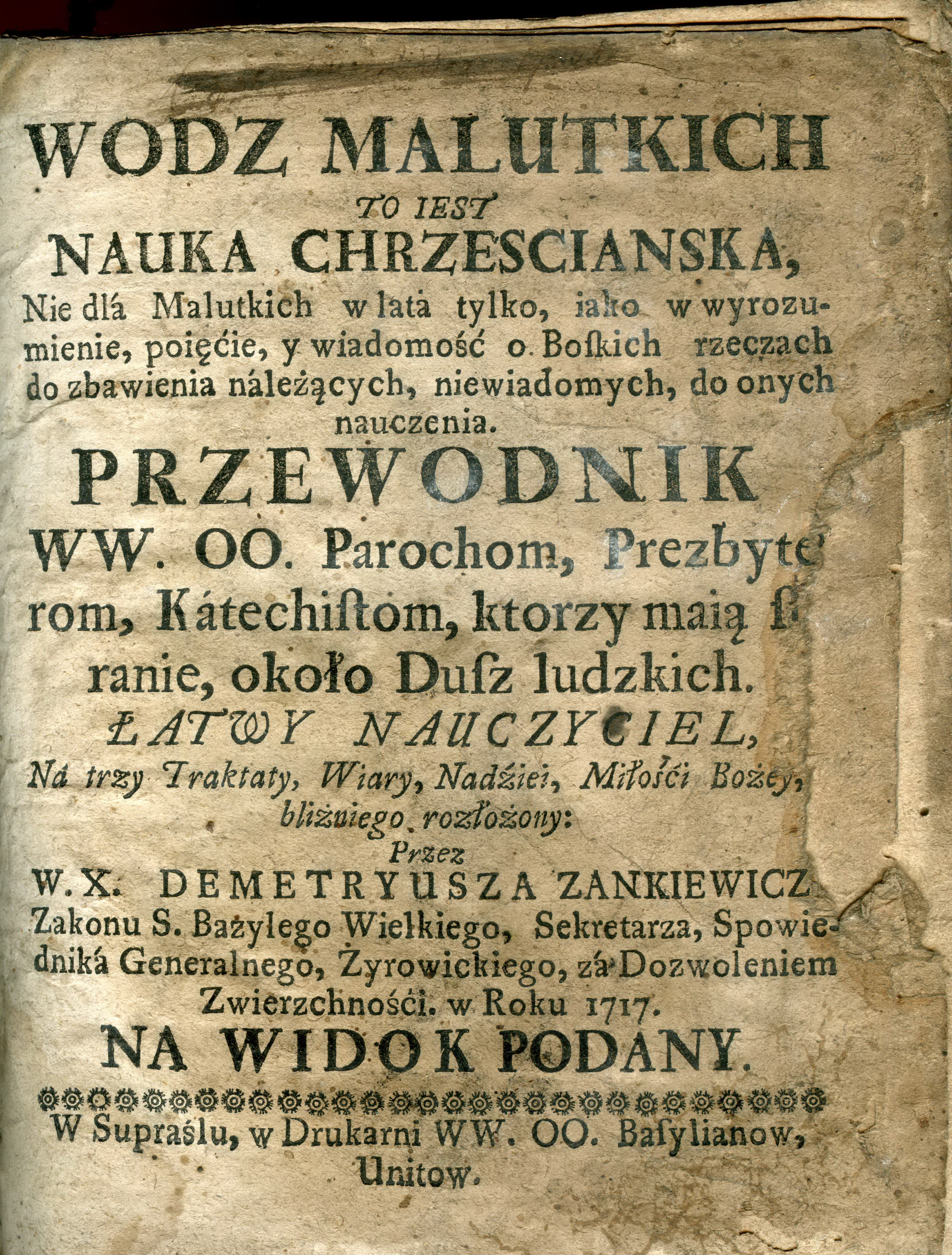 Тытульны аркуш кнігі:Зміцер Занкевіч. Правадыр малютак. Супрасль, 1717 г.